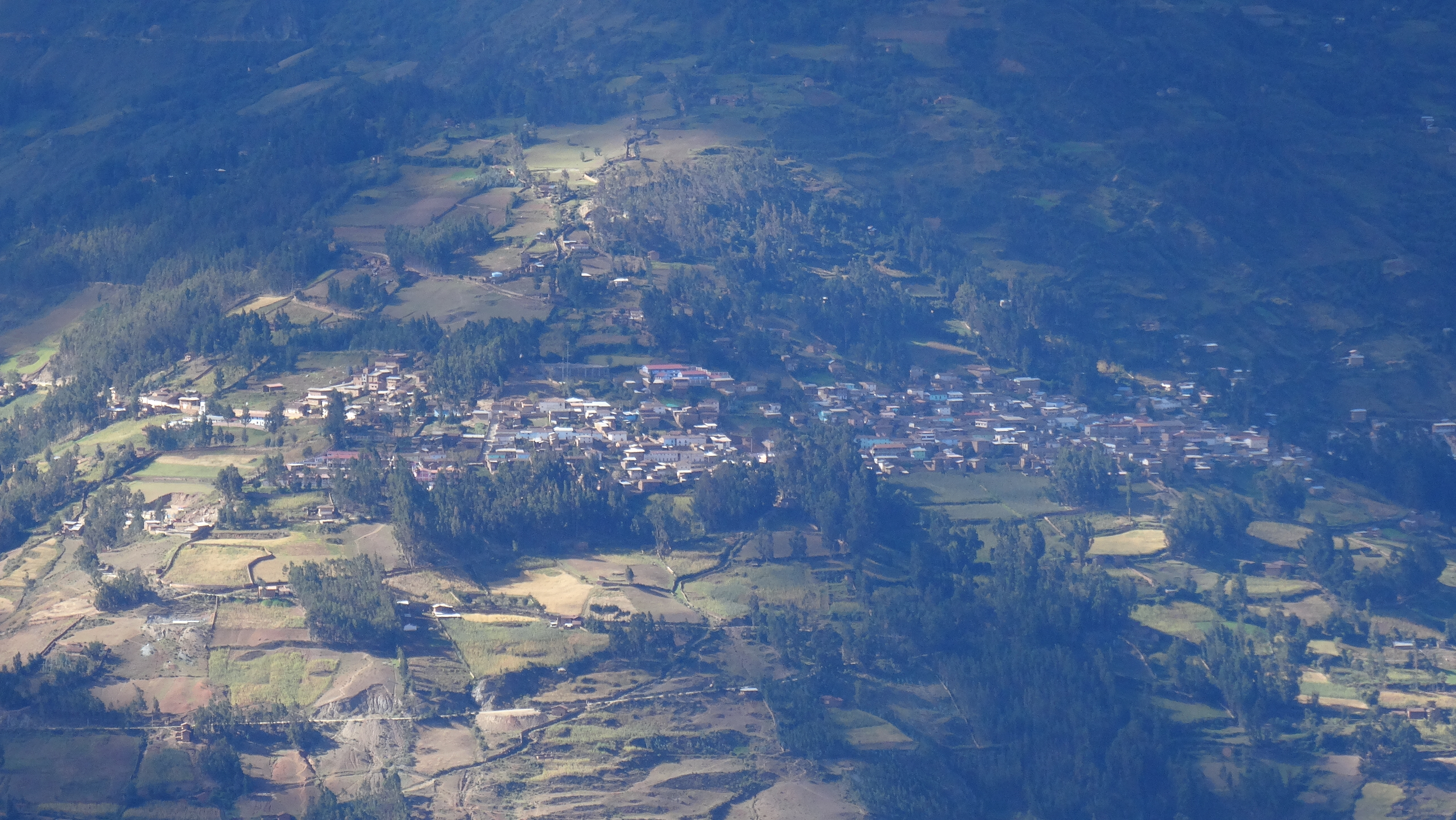 Ciudad de Huacaybamba vista desde la cima de la montaña Yarkan del distrito de Llamellín, Ancash.